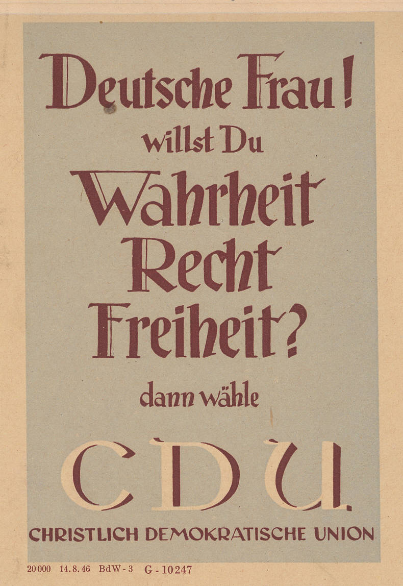 Deutsche Frau! willst Du Wahrheit Recht Freiheit? dann wähle CDU Christlich Demokratische Union Plakatart: Textplakat Allgemein Auftraggeber: CDUD G - 10247 Drucker_Druckart_Druckort: 20000 14.8.46 BdW-3 Objekt-Signatur: 10-024 : 3126 Bestand: Plakate aus der SBZ/DDR (10-024) GliederungBestand10-18: Ost-CDU / CDUD / Exil-CDU Lizenz: KAS/ACDP 10-024 : 3126 CC-BY-SA 3.0 DE